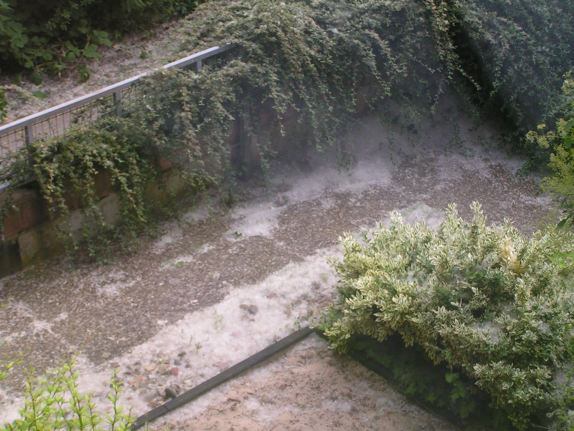 Pappel weißwollige Samen hinterm Haus